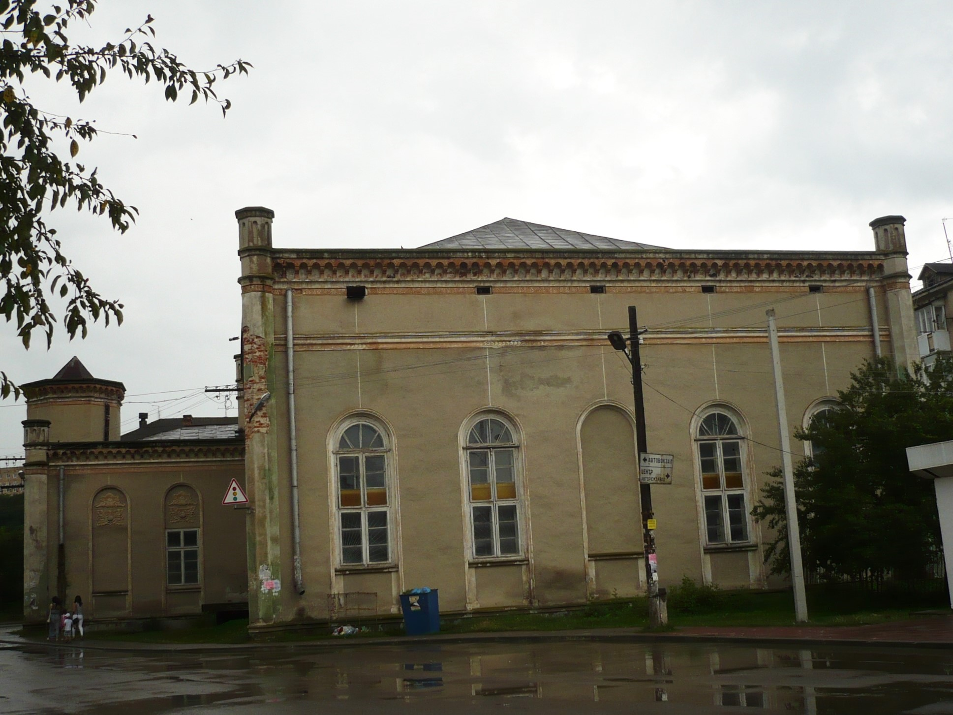 Czortków. Synagoga